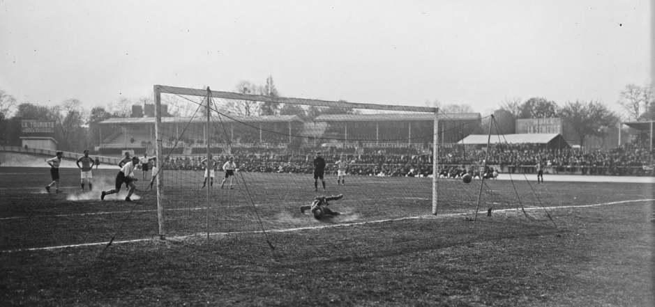 Parc des Princes en 1921 lors d'une demi-finale de Coupe de France